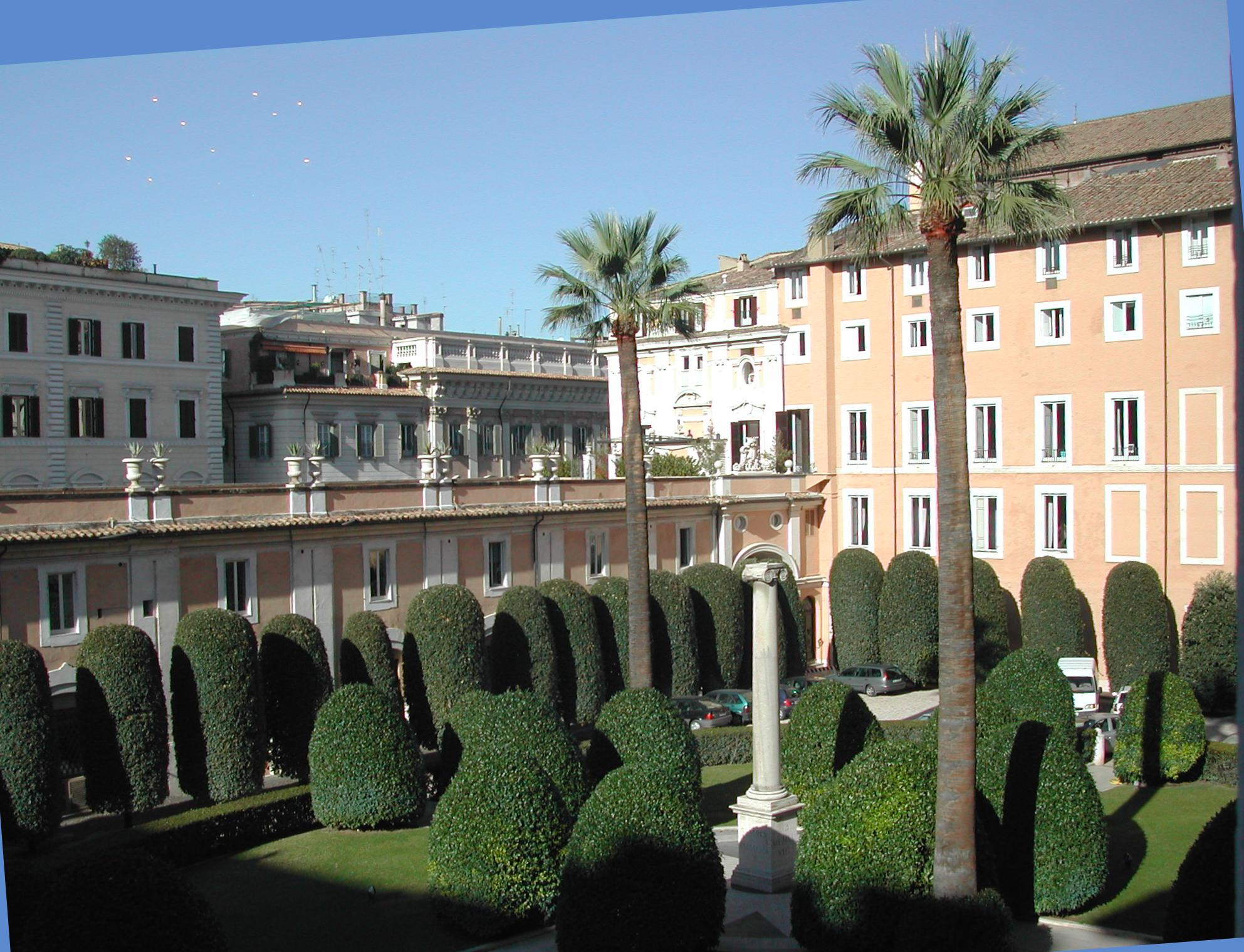 Roma, palazzo Colonna a Santi Apostoli: giardino interno